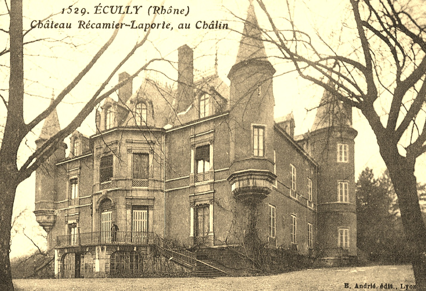 Propriété Laporte-Récamier : le bâtiment a été construit de 1858 à 1861 par l'architecte Benoît, sur le terrain qui faisait partie de le propriété du Treuil